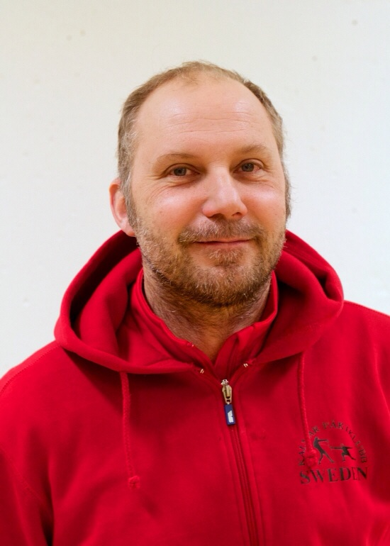 Picture taken, 2013.